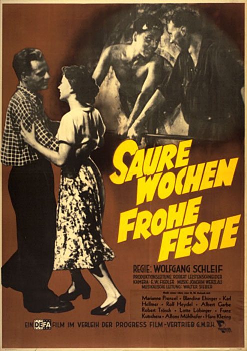 É a capa de um filme alemão de 1950.